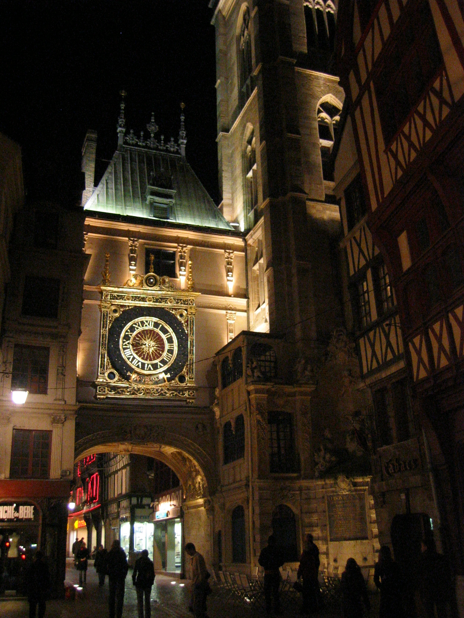 Rouen - Gros horloge (2)